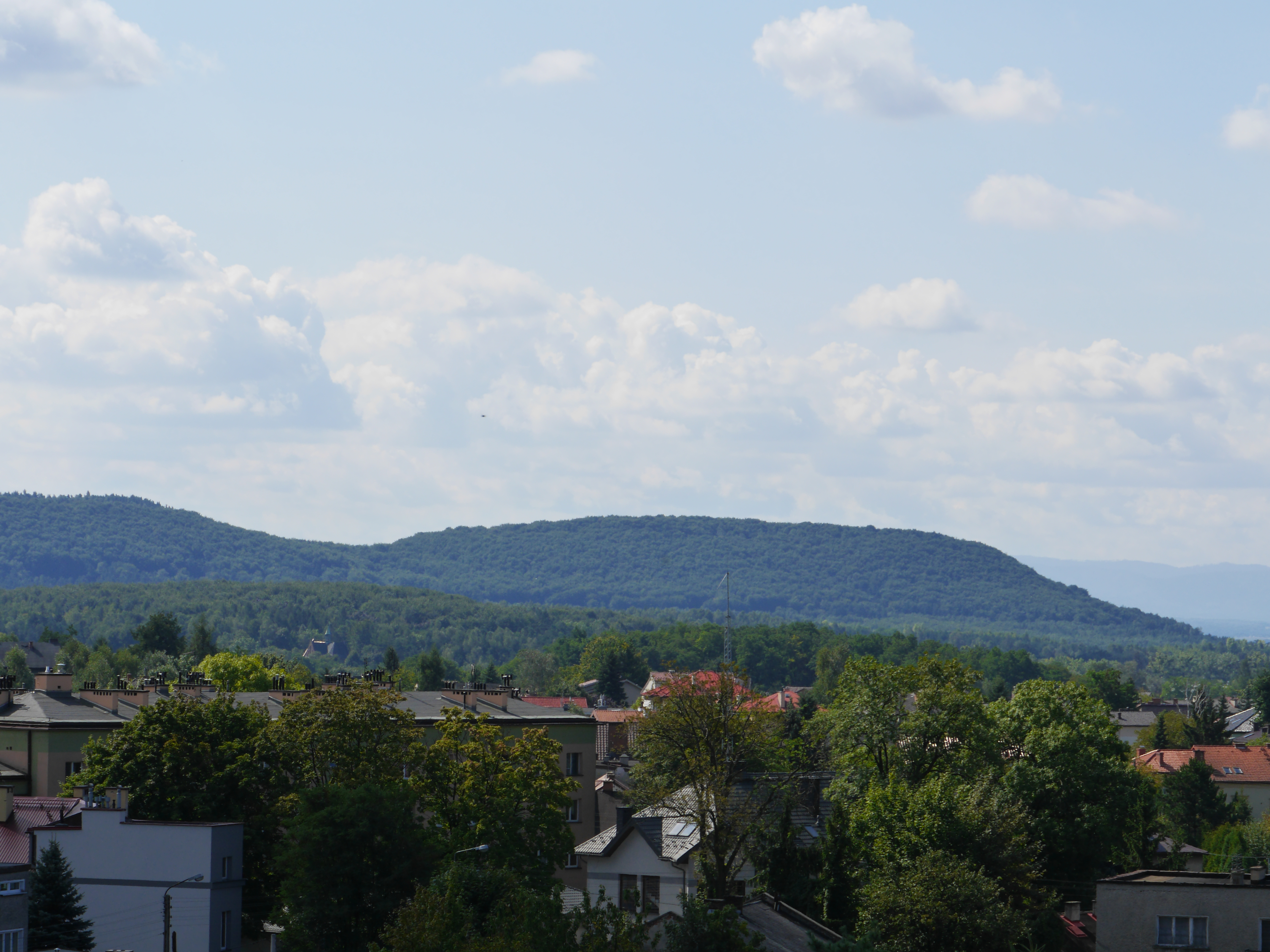 Komenda Powiatowa Policji w Chrzanowie This photo was taken with Panasonic Lumix DMC-GH3 camera, thanks to Panasonic. You can see all photographs in category: Taken with Panasonic Lumix DMC-GH3.